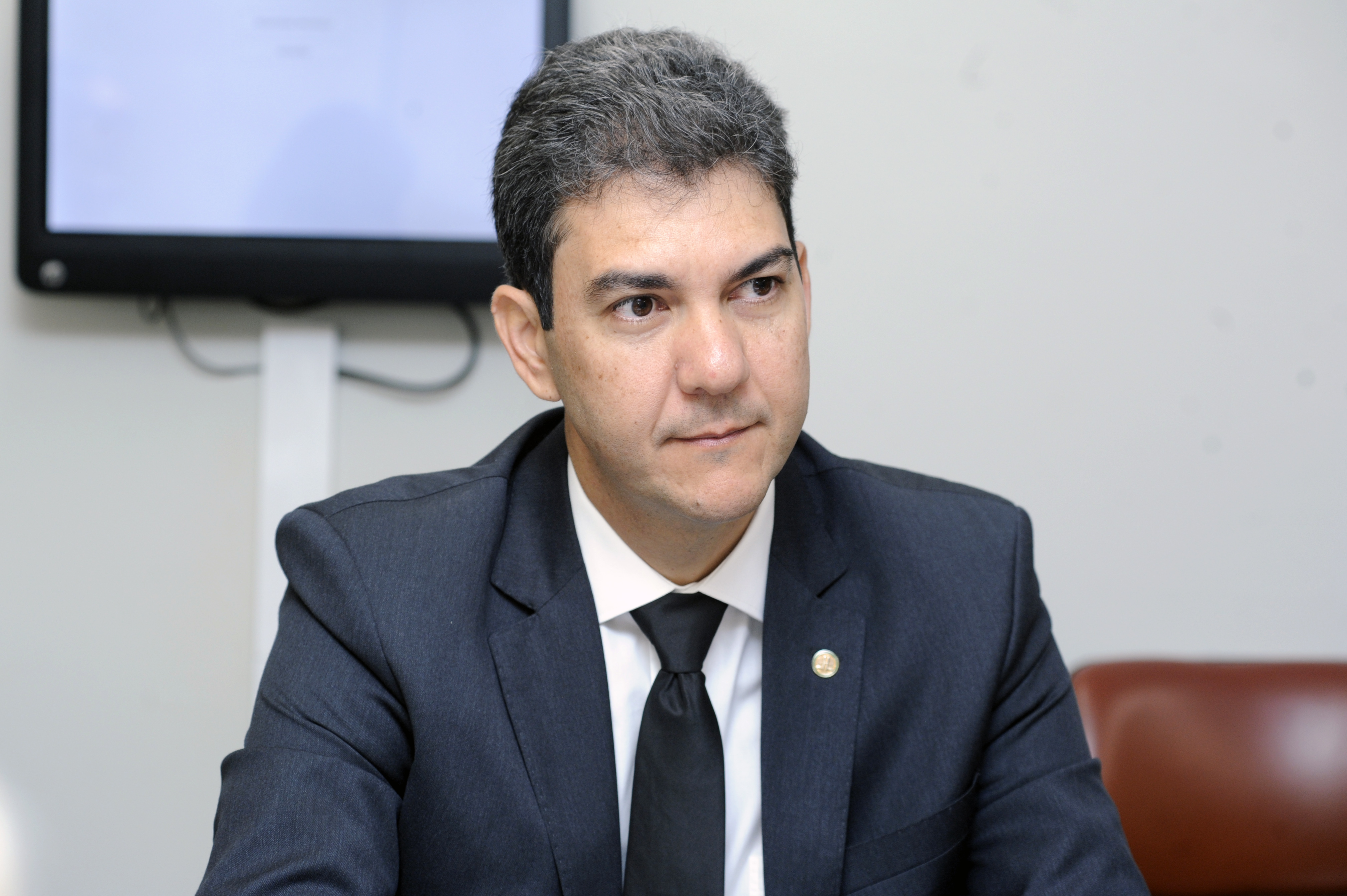 CSSF - Comissão de Seguridade Social e Família - 07/05/2019: Reunião Ordinária para deliberação do Plano de Trabalho; Escolha dos Relatores Setoriais; Discussão e votação do Plano de Trabalho. Dep. Eduardo Braide (PMN - MA)